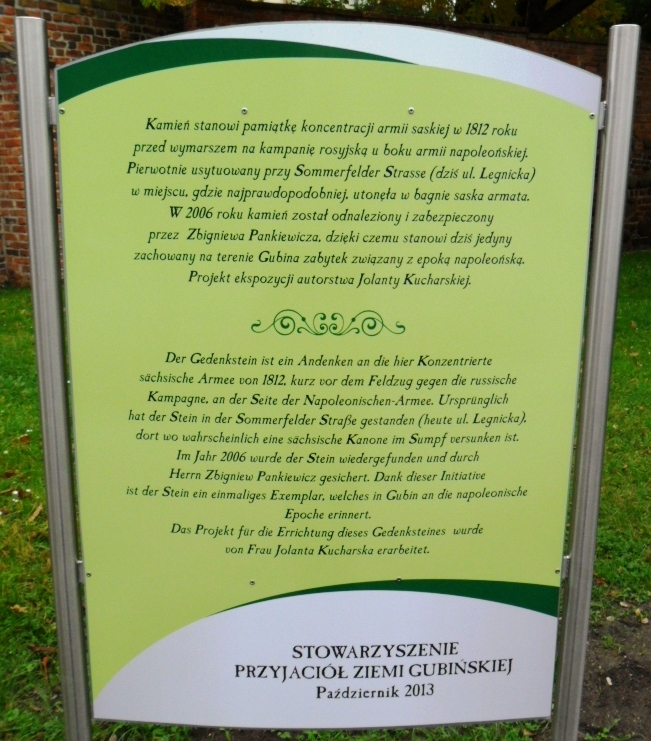 Tablica obok kamienia pamiątkowego